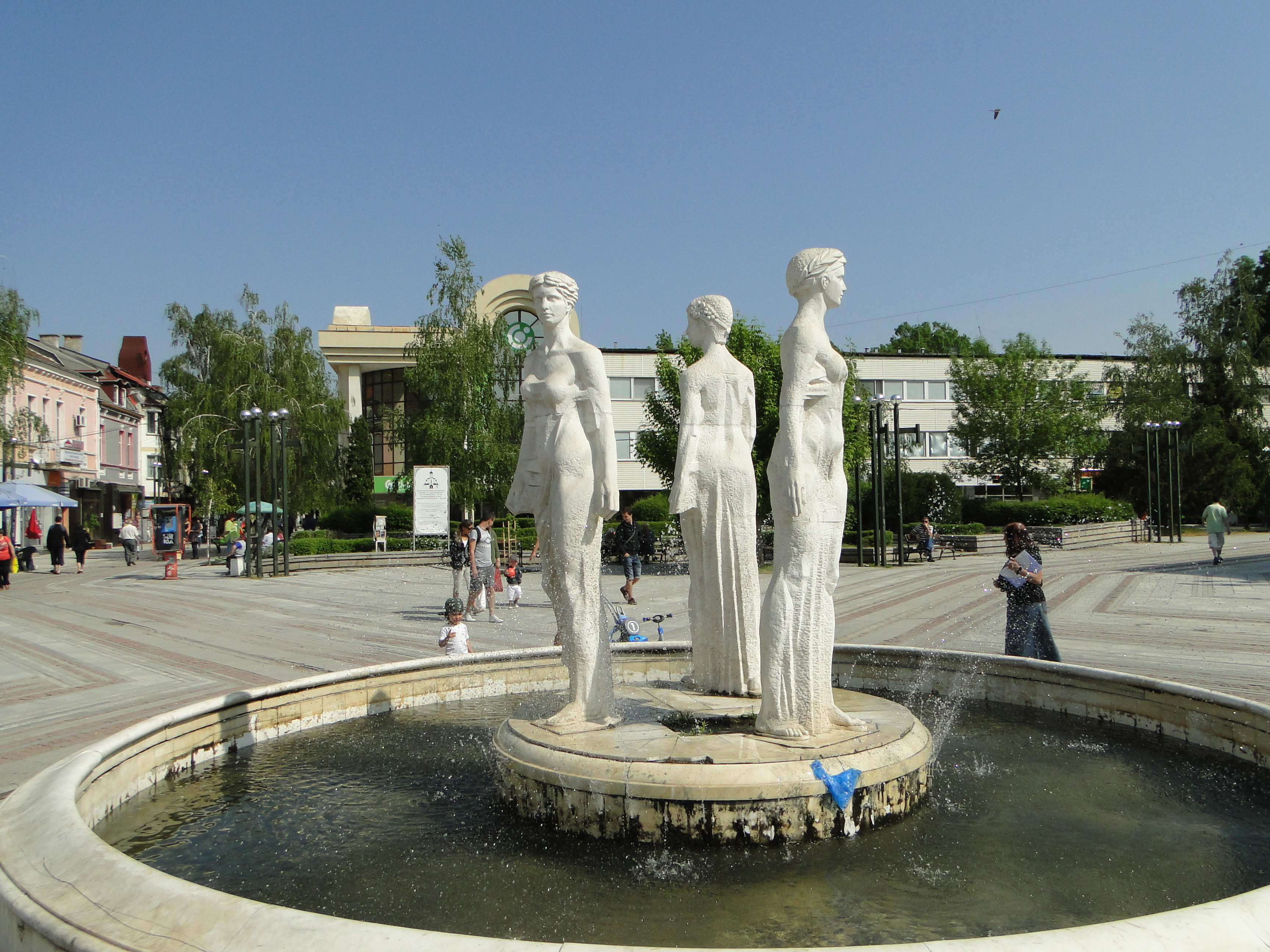 Видин, май 2013